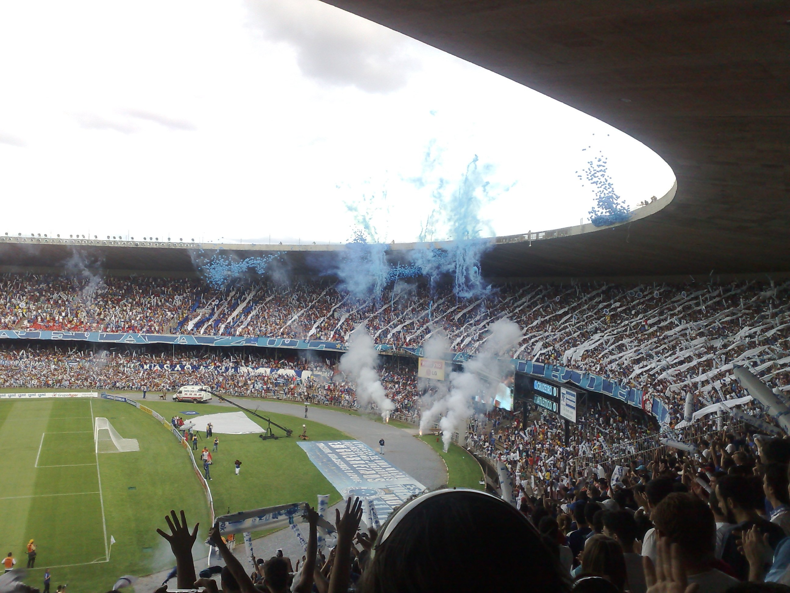 Mafia Azul no estadio